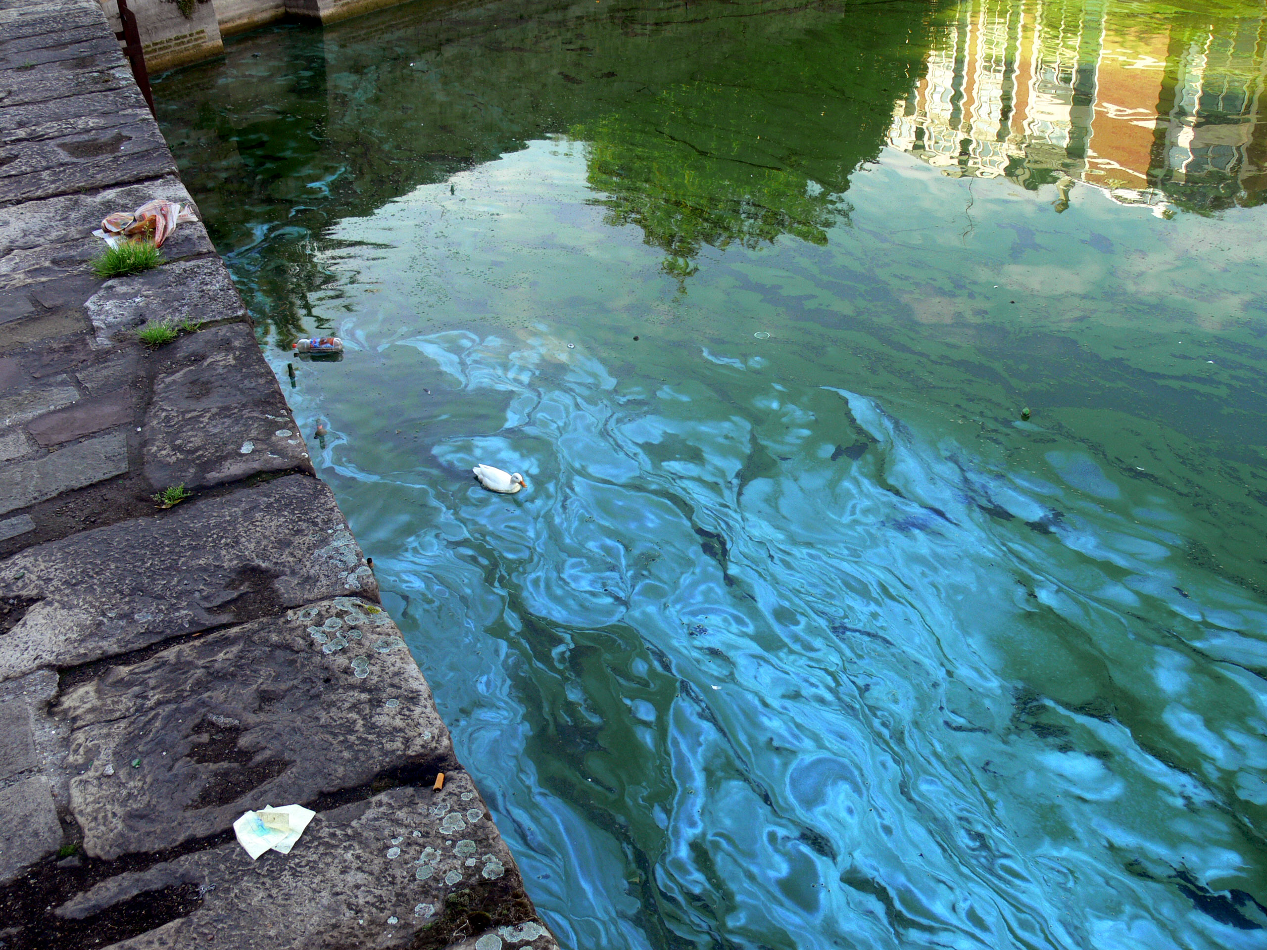 Inflorescence planctonique. Ce sont a priori des cyanophycées (algue bleue). Dans ce cas, quelques heures (ici une quinzaine d'heure) après le début de l'épisode, les taches bleues se sont étendues et elles s'accumulent sur les bords d'une pièce d'eau (bras d'ancien canal, aujourd'hui fermé). Les traces en forme de trainées sont des traces laissées par des poissons et des canards qui circulent sur l'eau, "cassant" le biofilm. La couleur bleue caractérise des zones d'accumulation de pigments bleus libérés par des bacéries mortes. Ici l'eau a une consistance de «soupe» sur les 5 à 10 mm, sous la surface. Lieu : quai du Vault à Lille, non loin du centre ville (France), après une longue période pluvieuse (non caniculaire, et même sous les moyennes saisonnières, mais avec des nuits inhabituellement douces). Le canal proche (Deûle) est également couvert d’une couche de plancton vert sur de vastes surfaces (centaines de mètres carrés), mais beaucoup moins épaisse. Les échantillons dégagent une forte odeur d'algue (type spiruline).